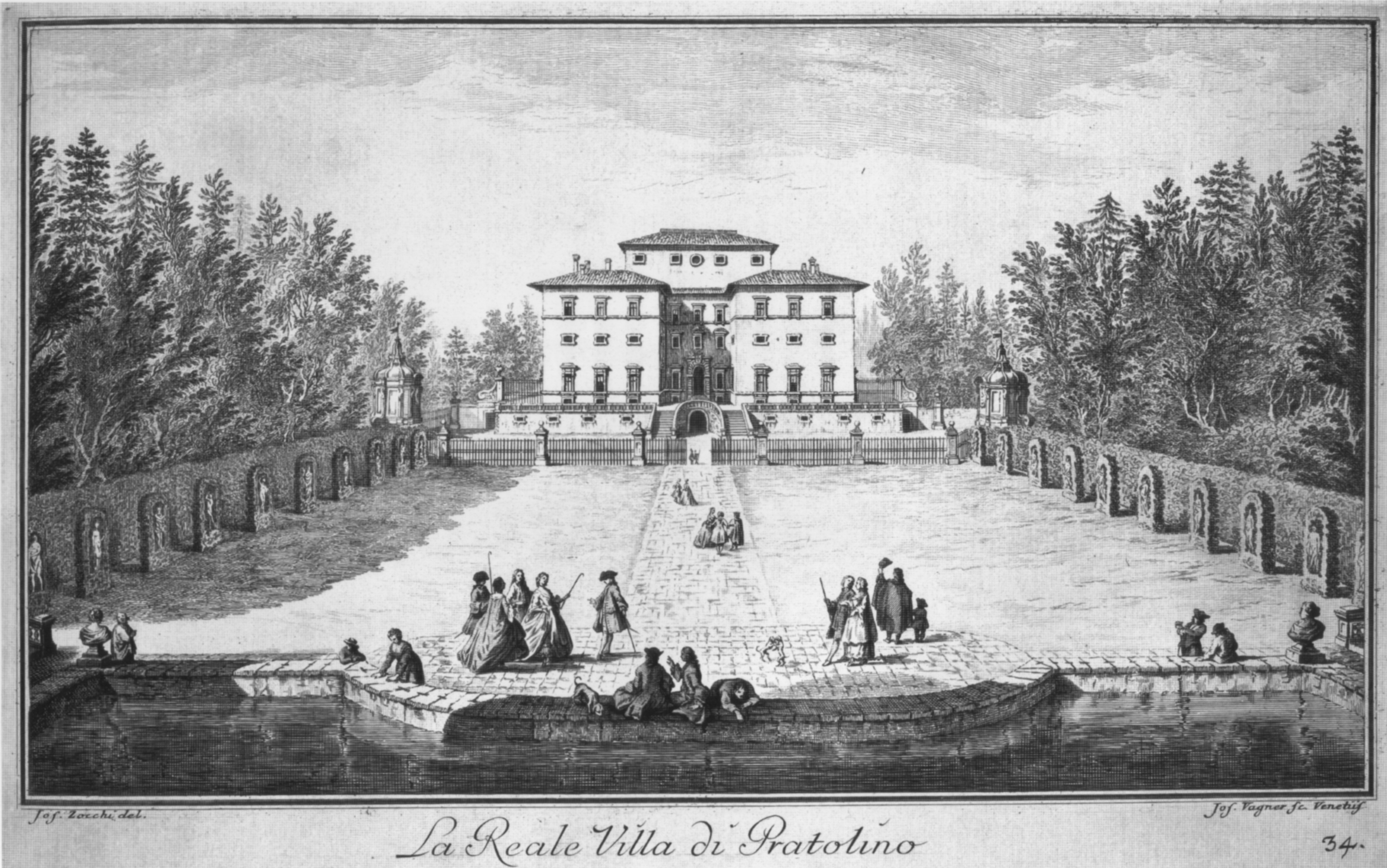 Zocchi, ville 36 pratolino